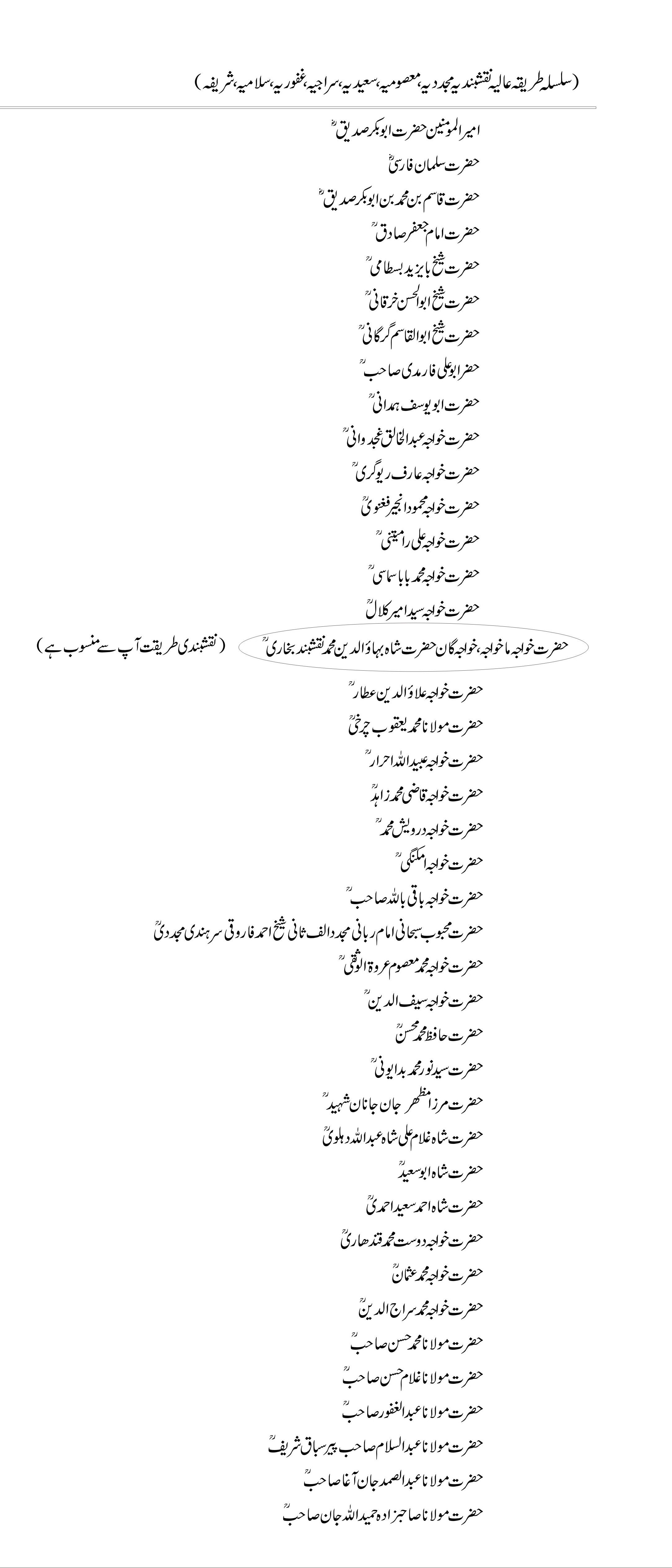 نقشبندیہ طریقت سلسلہ